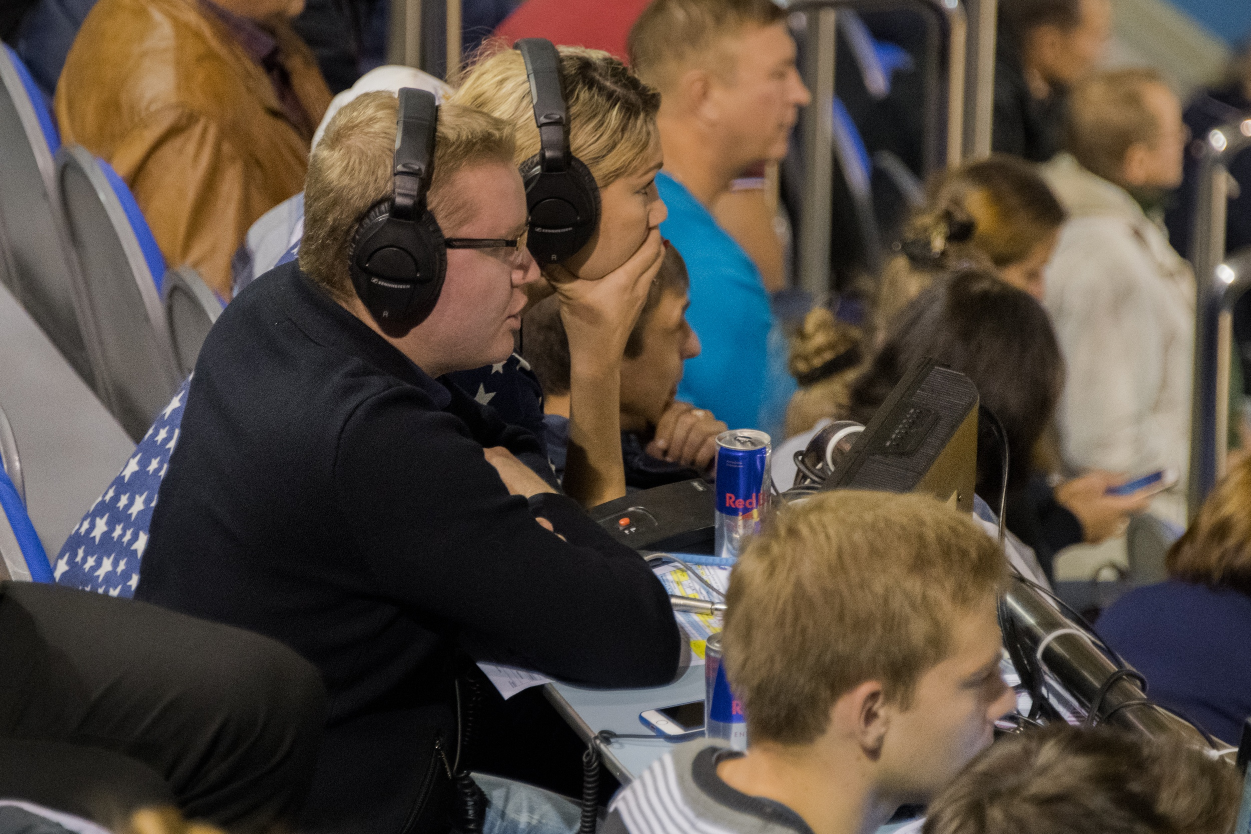 Комментаторы ГК "Звезда".